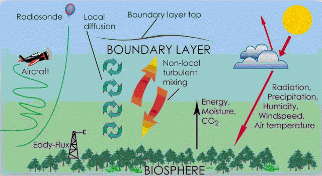 Diagrama das diversas formas de medições das variáveis meteorológicas e micrometeorológicas, através de Eddy Correlation, Radiossondas e aviões.